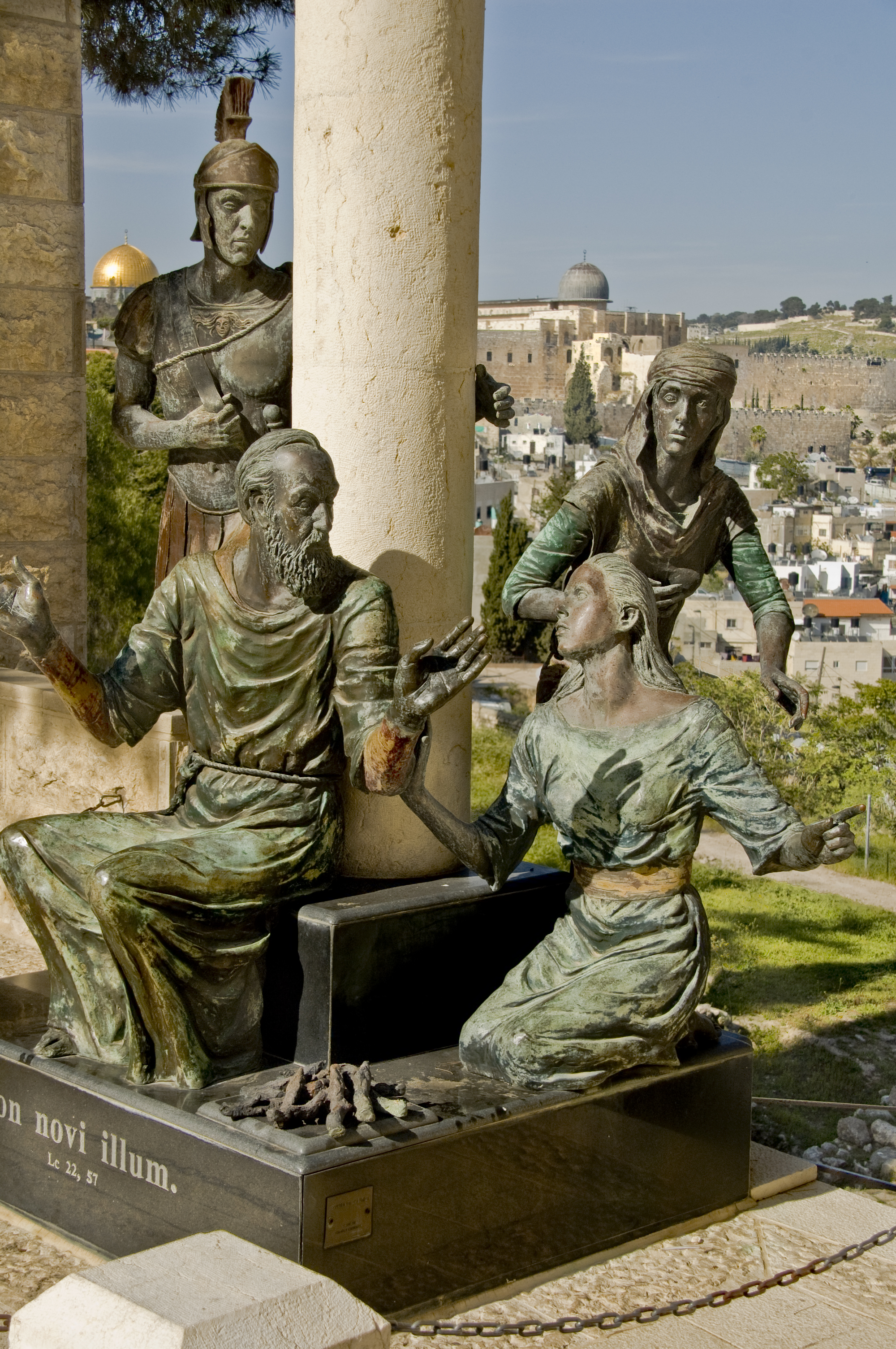 כנסיית פטרוס אין גליקנטו היא כנסייה ומנזר מודרניים בהר ציון השייכים למסדר האסומפסיוניסטים הקתולי. המבנה ביזנטי ובנוי כצלב קצר-זרועות. לכנסייה כיפה ובראשה שבשבת בדמות תרנגול. ליד הכנסייה מוצג דגם של ירושלים בתקופה הביזנטית.